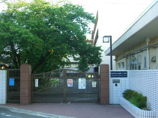 山二校門です